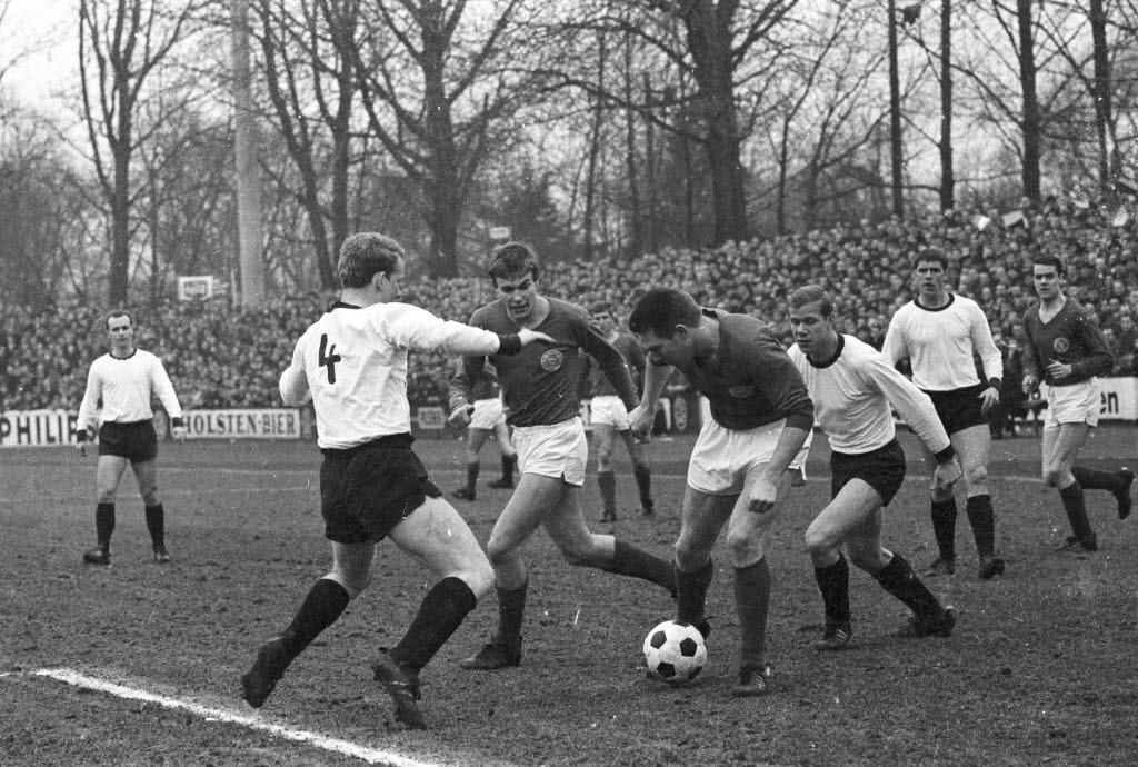 im Holsteinstadion. Im Bild u.a. Holsteins Stürmer Gerd Koll (4.v.r.).